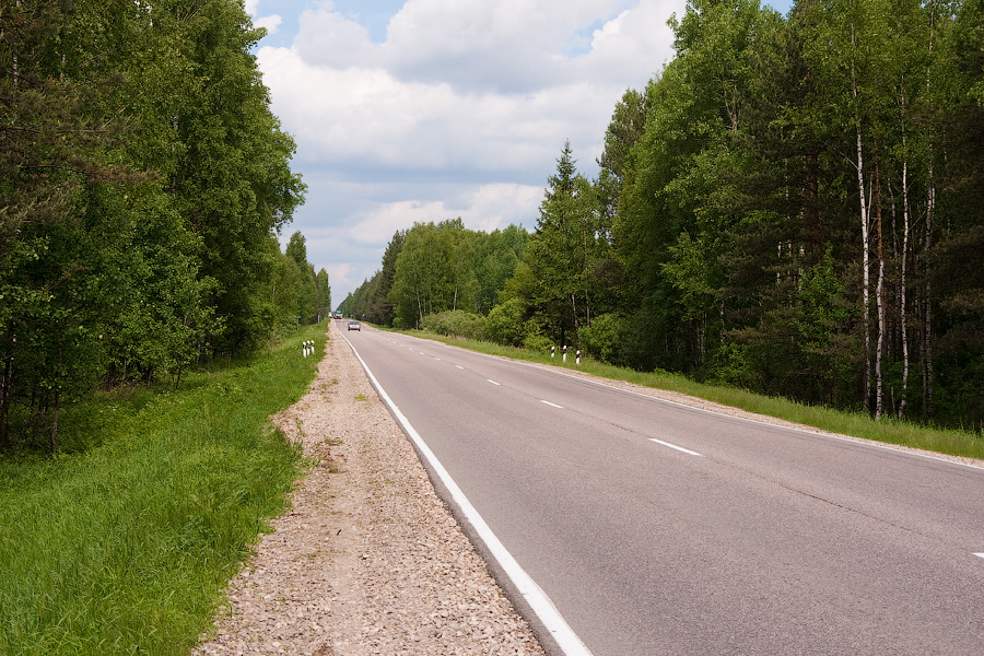 Автодорога А108 (большое бетонное кольцо) вокруг Москвы, Владимирская область